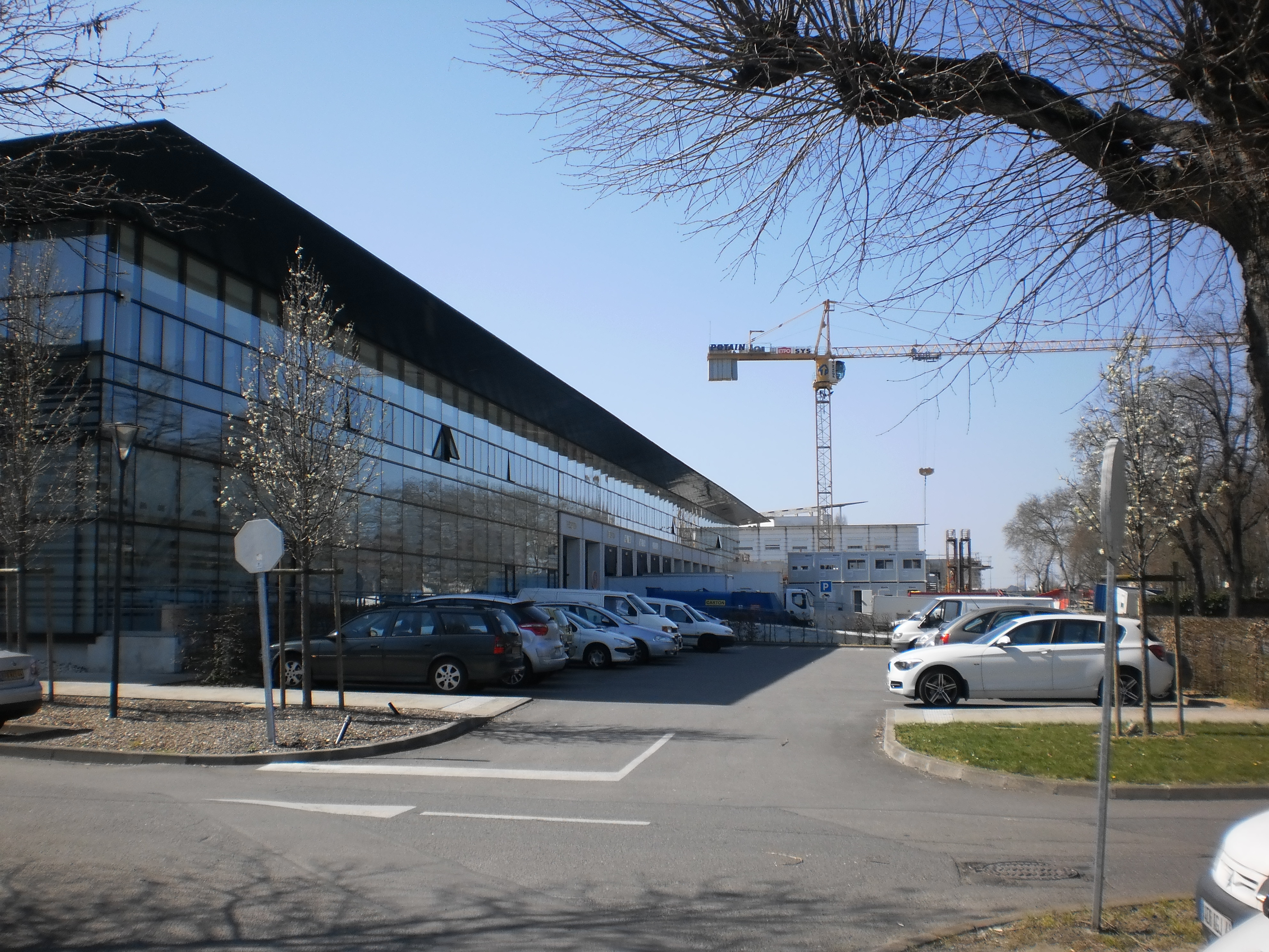 Hôpital Saint-Jacques de Nantes (France) - Bâtiment du pôle technique This edifice is inscrit Monument Historique. Object location 47° 11′ 49.79″ N, 1° 32′ 13.56″ W This and other images at their locations on: Google Maps - Google Earth - OpenStreetMap - Proximityrama(Info)